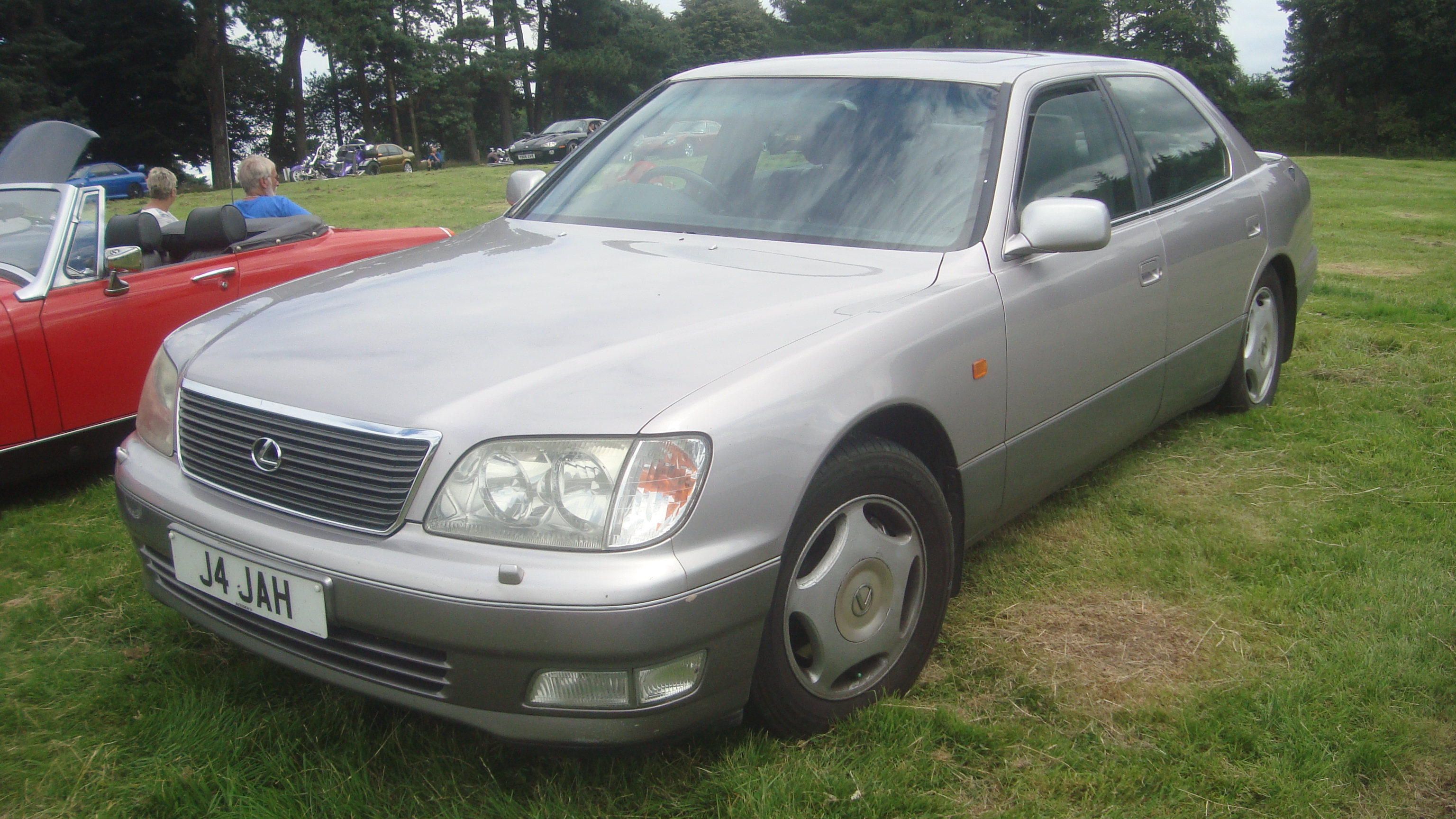 1998 Lexus LS400 Auto